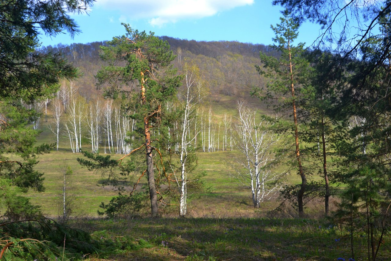 Шульган-Таш заповедник: Заповедник находится на западном макросклоне Южного Урала, водоразделе рр. Белая и Нугуш (скальный массив Шульган-Таш). Местонахождение заповедника определяется координатами: 52°90 ’ - 53°10’ с.ш. и 57°00’ - 57°15’ в.д,Бурзянский район, Башкортостан This image is related to the protected area of Russia number 0200105